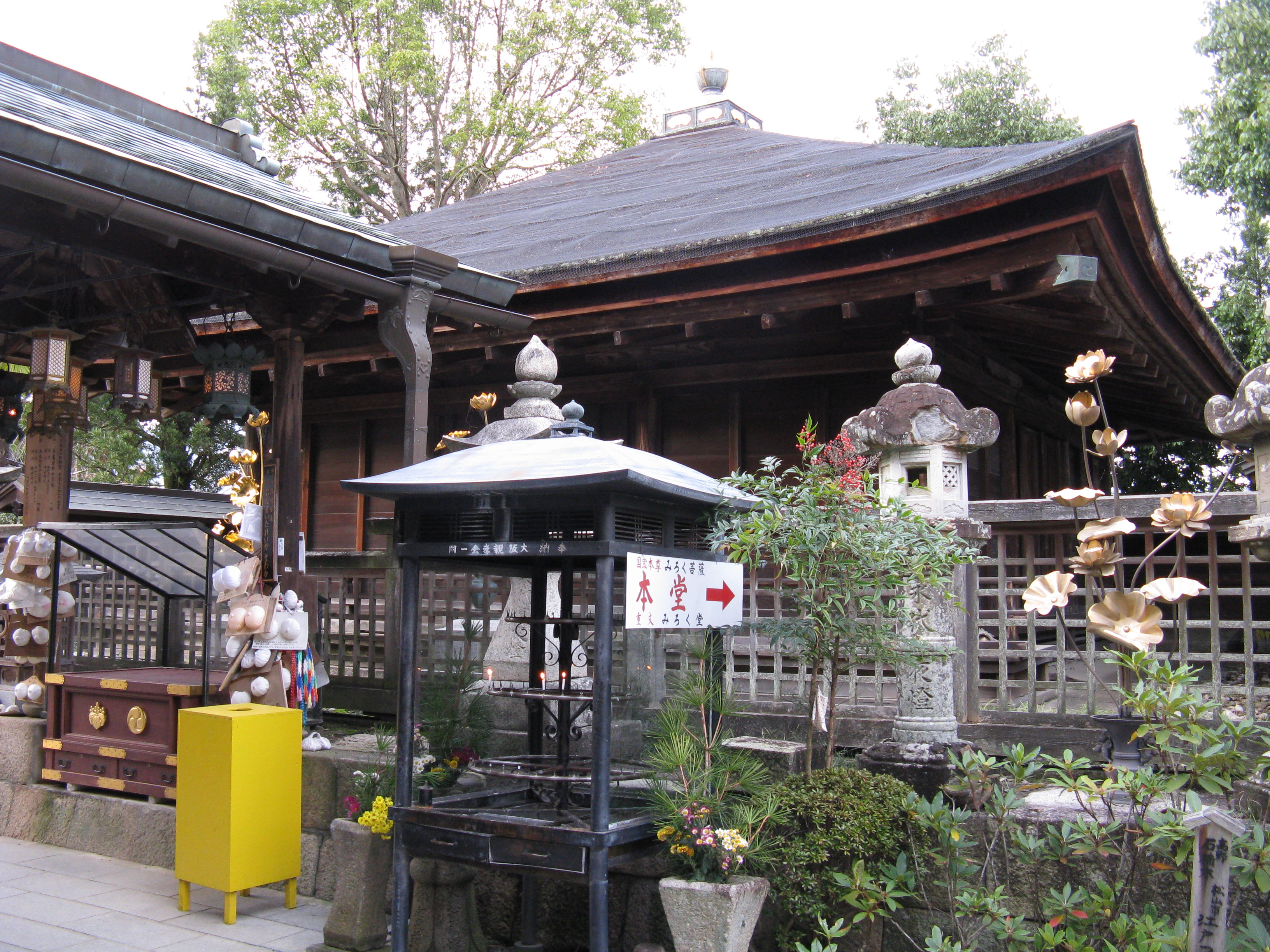 慈尊院 本堂